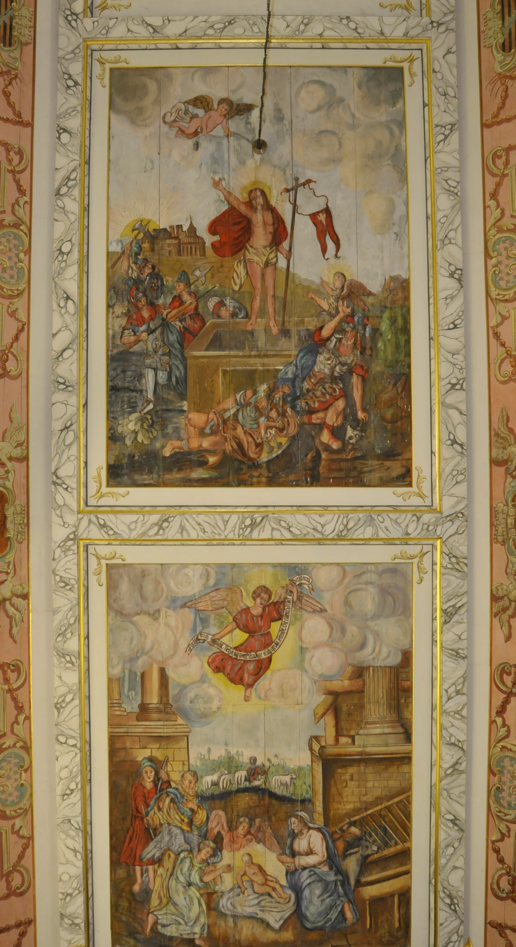 Finsterbergen, Kirche, Deckengemälde